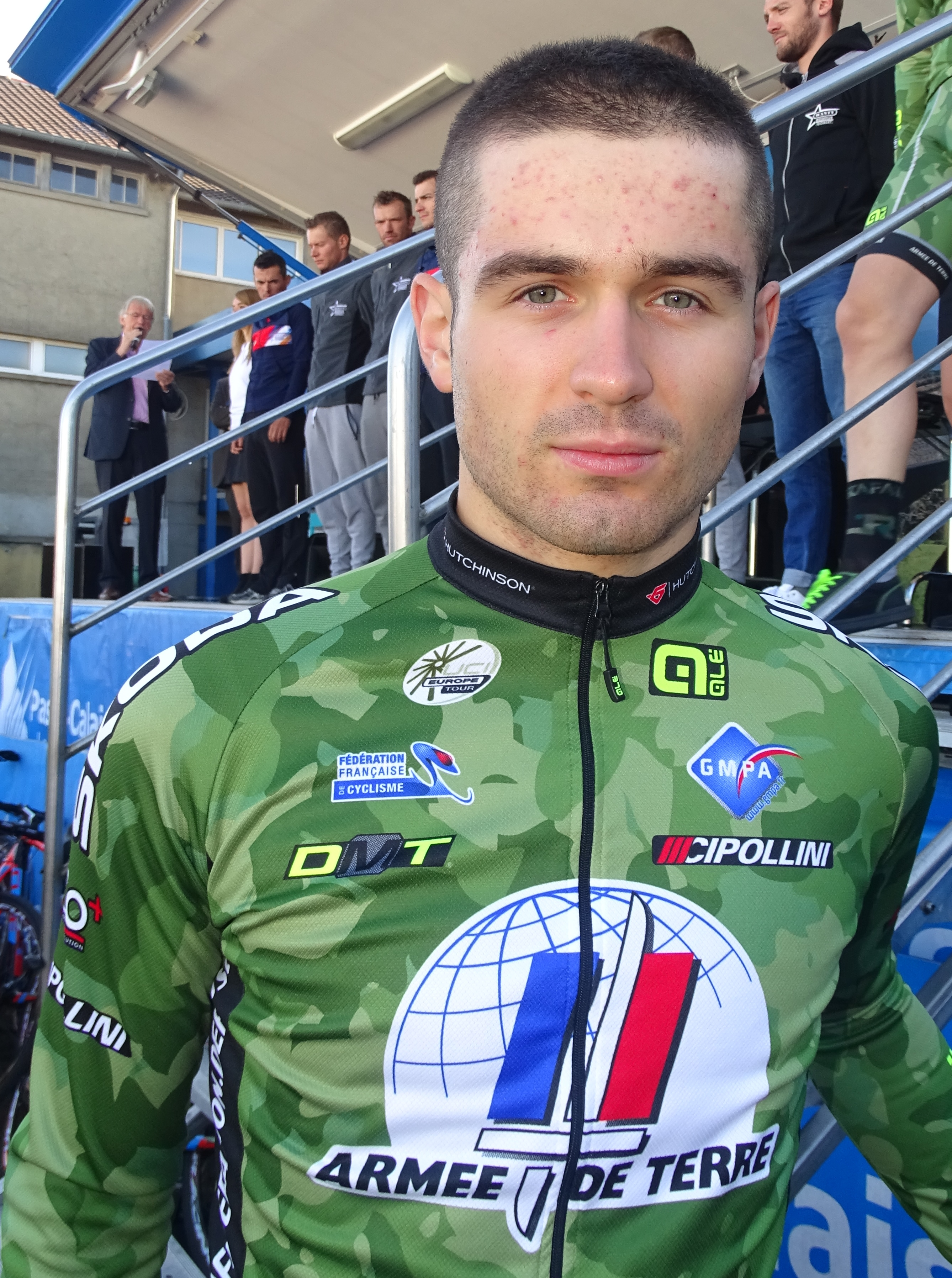 Reportage réalisé le dimanche 20 septembre à l'occasion du départ et de l'arrivée du Grand Prix d'Isbergues 2015 à Isbergues, Nord-Pas-de-Calais, France.